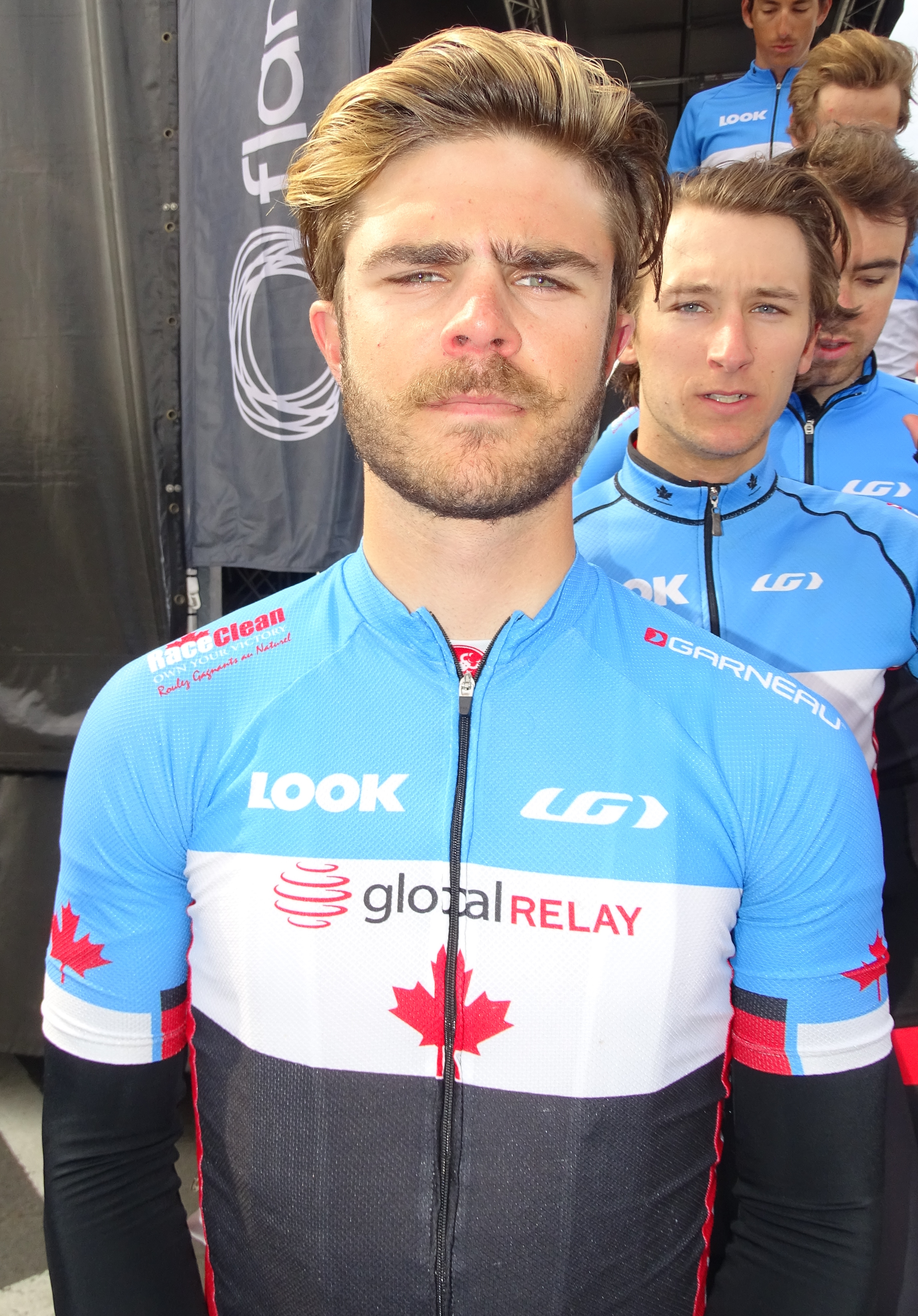 Reportage réalisé le samedi 9 avril à l'occasion du départ et de l'arrivée du Tour des Flandres espoirs 2016 à Audenarde, Belgique.